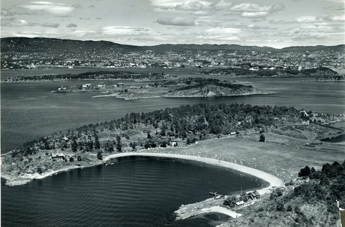 Langøyene in Oslo, Norway